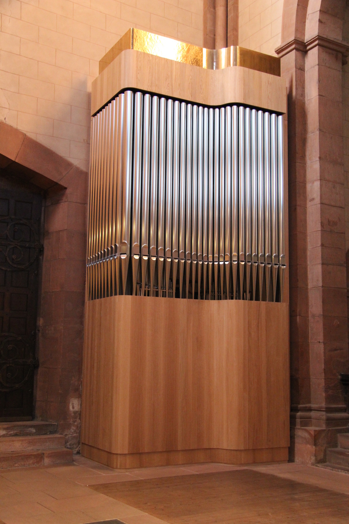 Die Winterhalter-Chororgel in der Marienkirche Gelnhausen